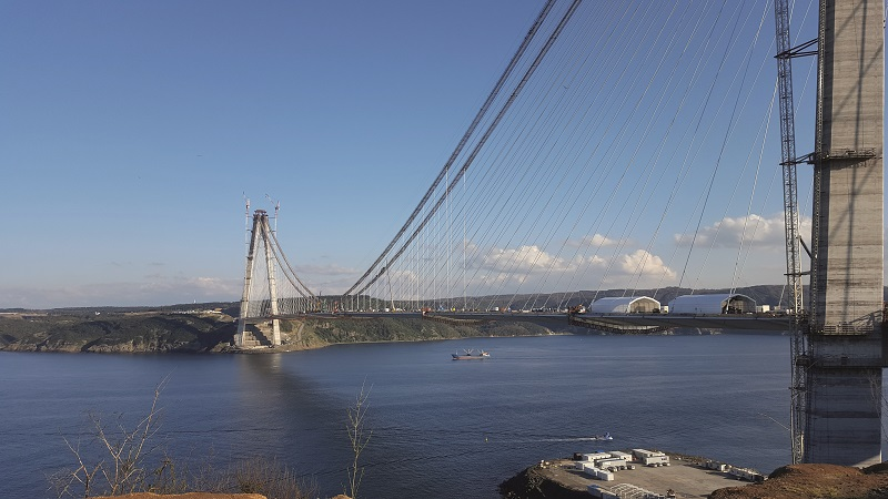 Dokončený most